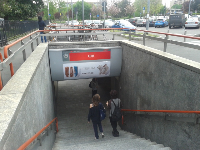 Scala di ingresso alla stazione di QT8